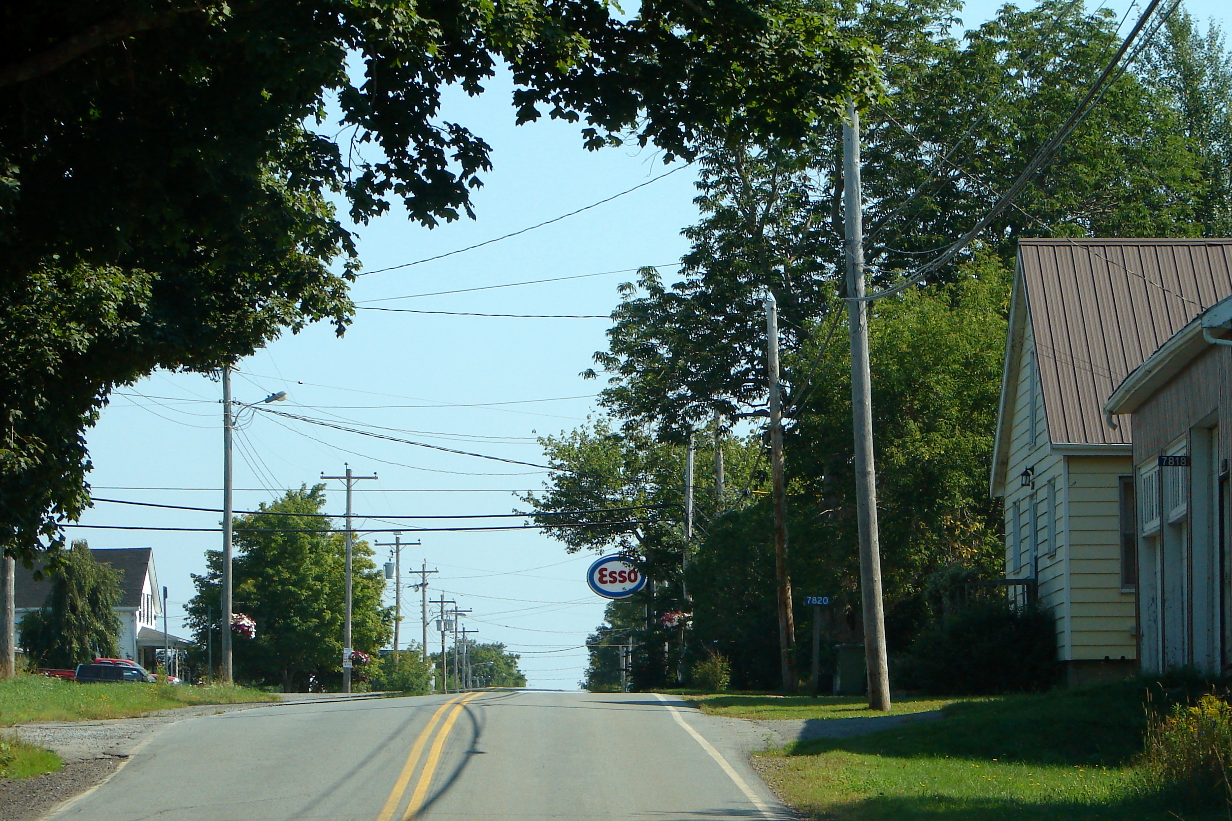 Middle Musquodoboit, Nova Scotia, Canada